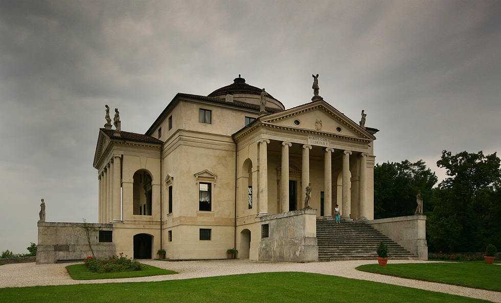 Palladios Villa Rotonda, Veneto, Italy